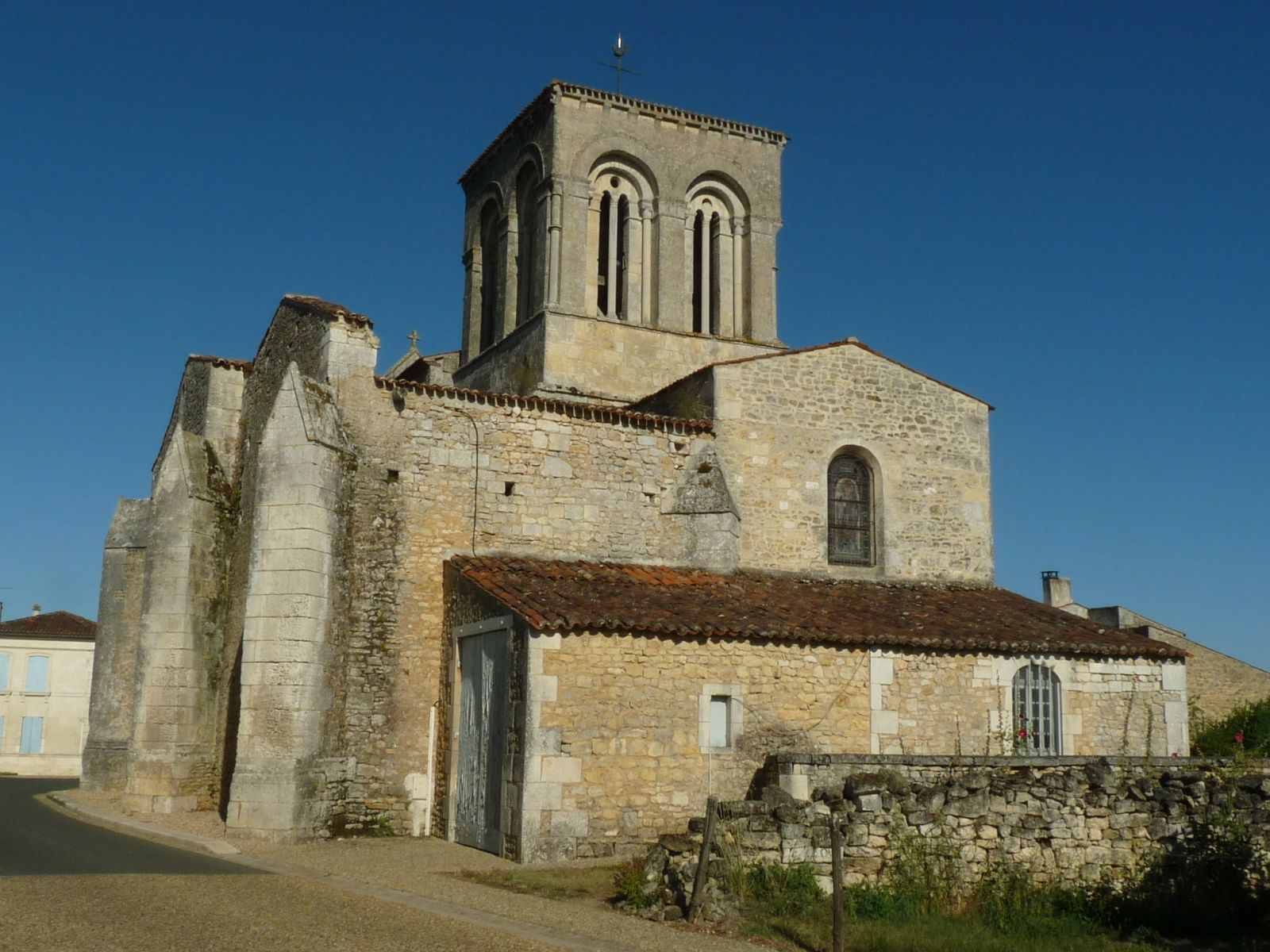 église de Montpellier-de-Médillan (17), France.